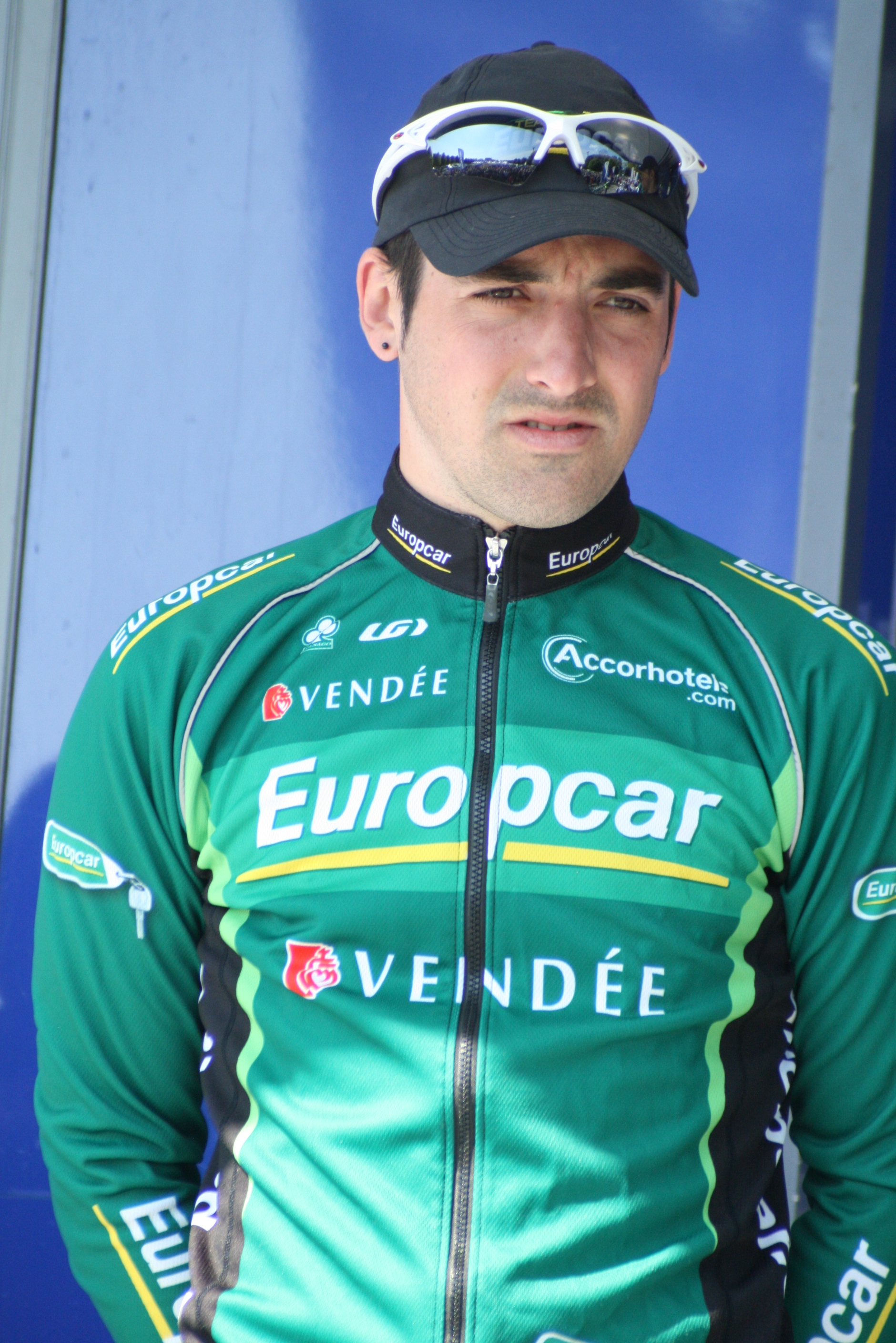 Présentation des coureurs au départ de la première étape Sébastien Turgot